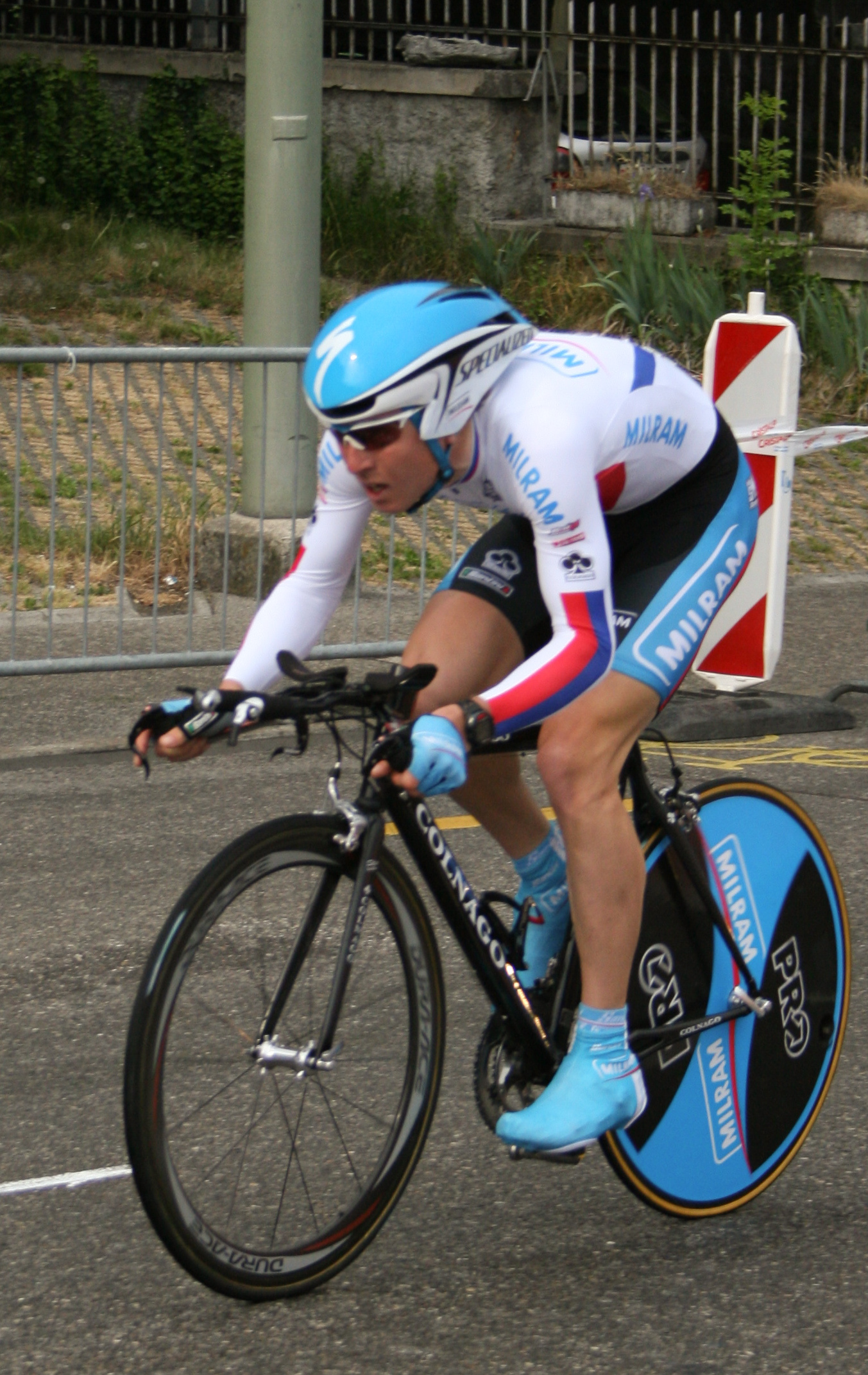 Matej Jurco prologue du Tour de Romandie 2007